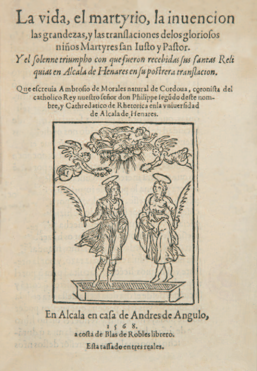 Portada del libro La vida, el martirio, la invención, las grandezas y las translaciones de los gloriosos niños mártires San Justo y Pastor. Publicado por Ambrosio de Morales, en Alcalá de Henares, en 1568.